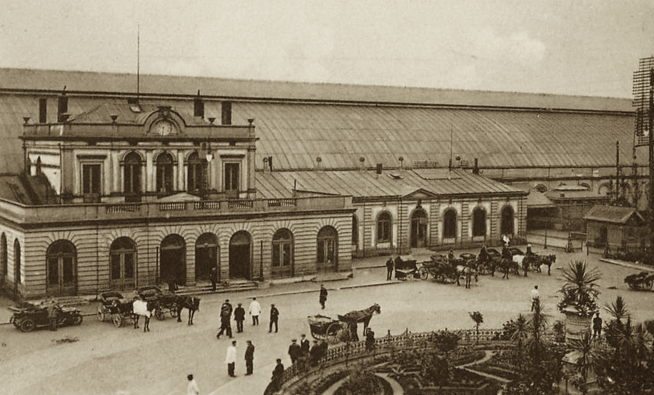 Deze foto toont het station van Kortrijk rond het einde van de 19de eeuw. Tijdens de eerste wereldoorlog werd het station beschadigd maar niet vernield. De koepel van staal en glas werd compleet vernield in 1944 tijdens een bombardement.